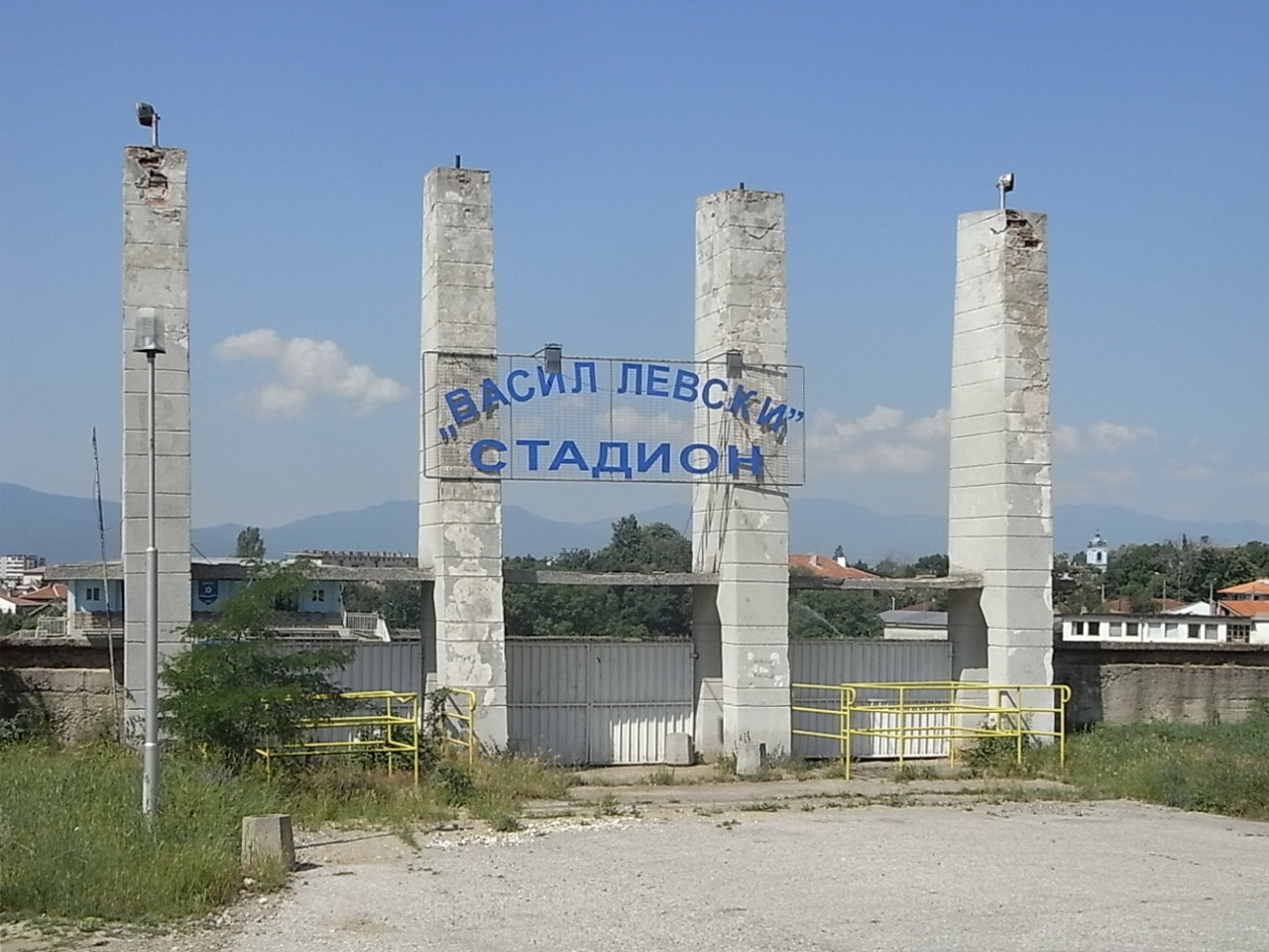 Eingang zum Stadion "Wasil Lewski" in Karlowo (BG).